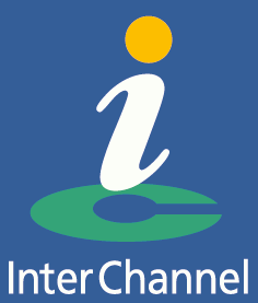 中文（台灣）: NEC Interchannel（Interchannel Inc.前身）商標。